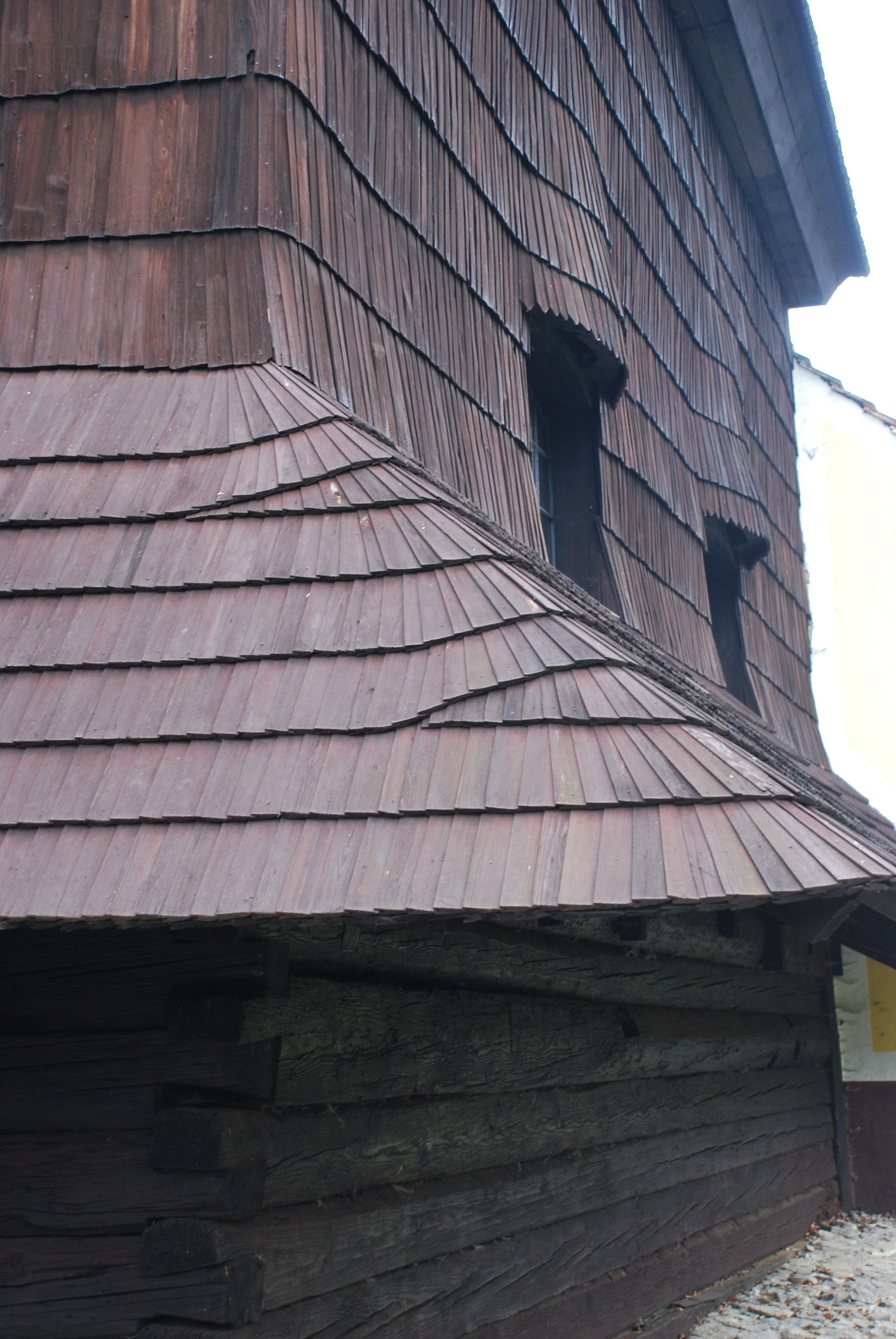 Daszek okapowy w kościele pw. Wszystkich Świętych w Sierotach